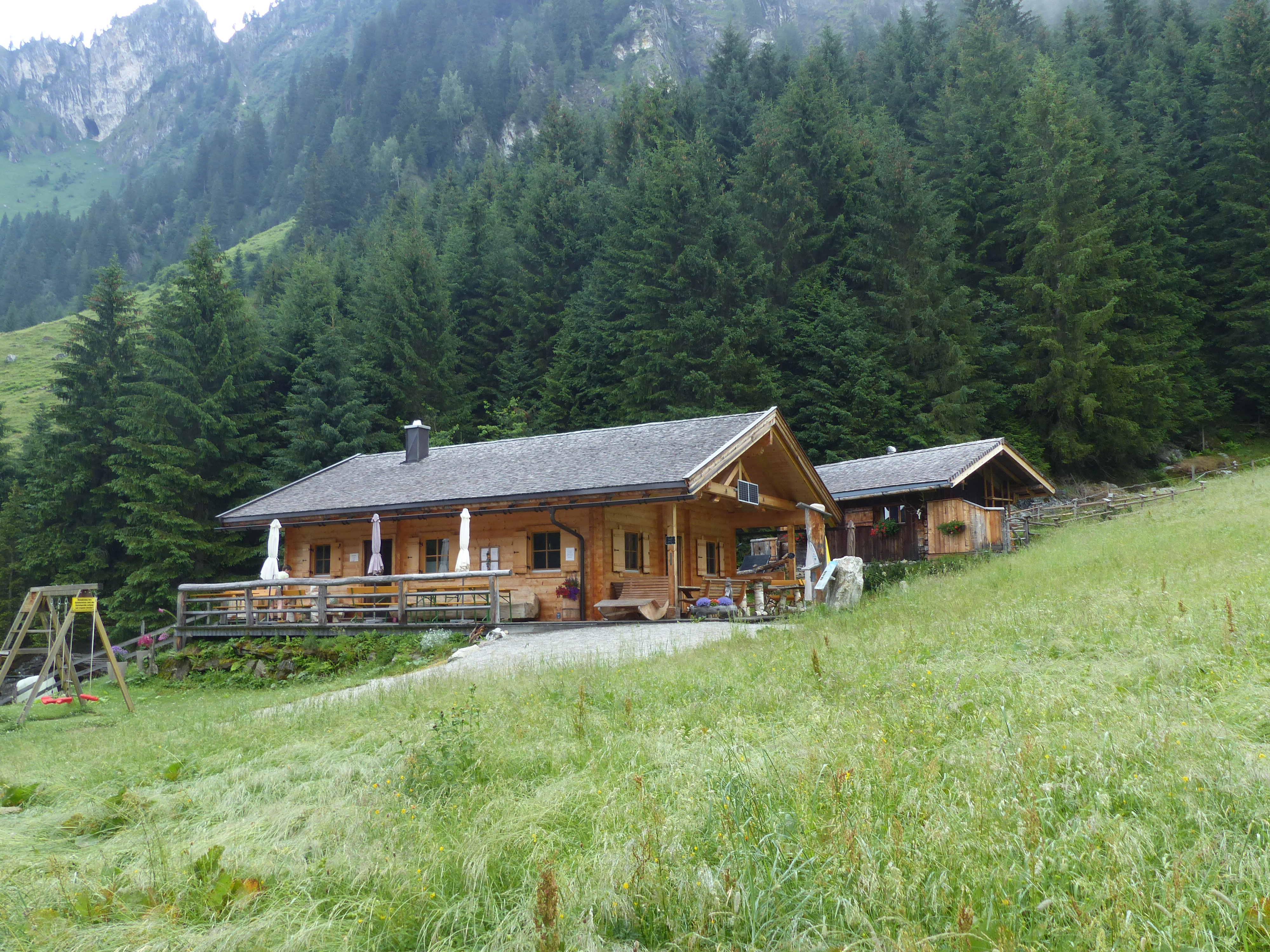 Kampriesenalm: Neue Hütte mit Bewirtschaftung